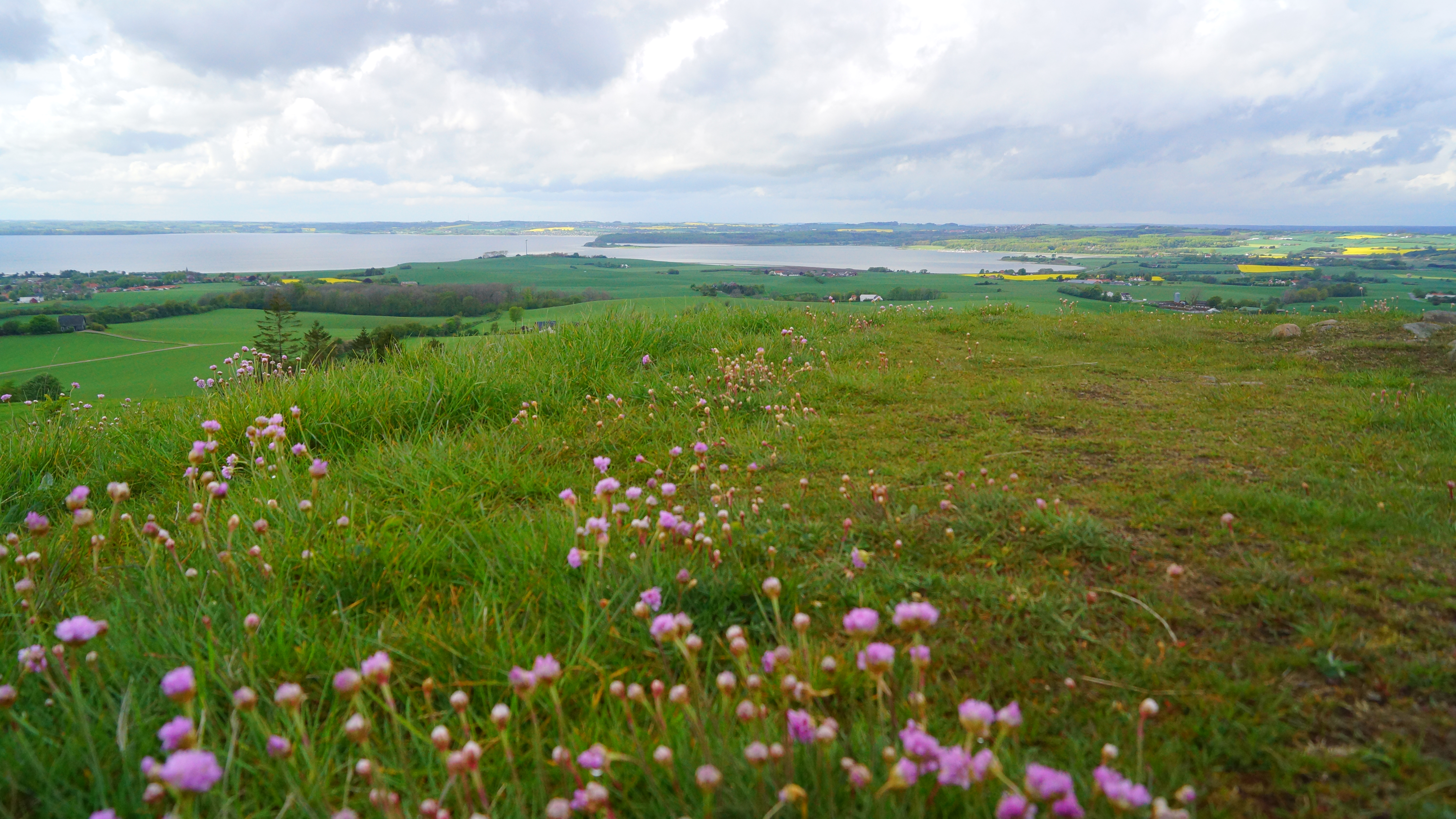 Stabelhøje udsigt